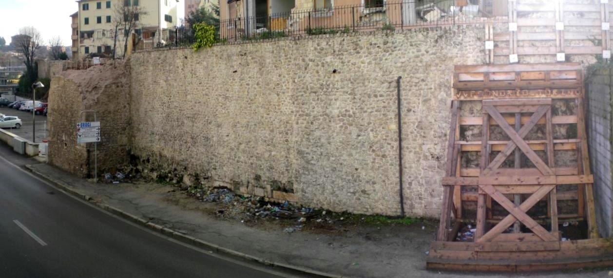 Resti di Porta Barete (L'Aquila) e danneggiamenti in seguito al terremoto del 2009